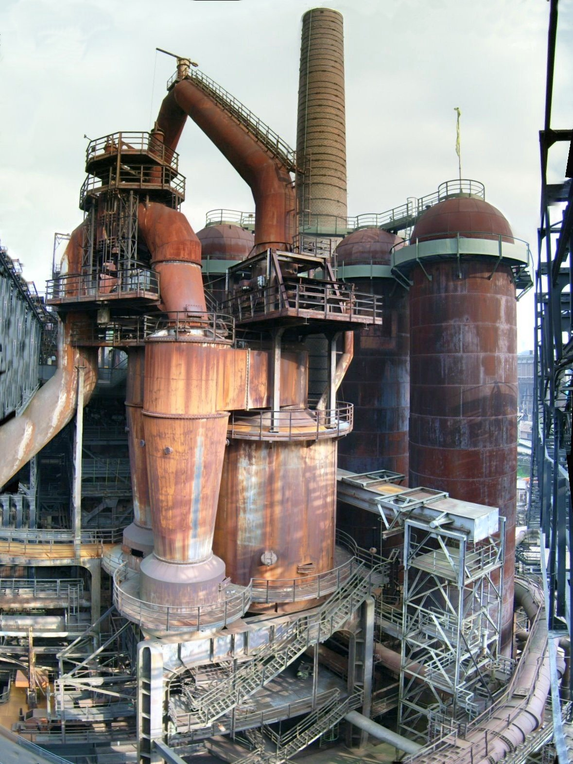 Hochofen der Völklinger Hütte